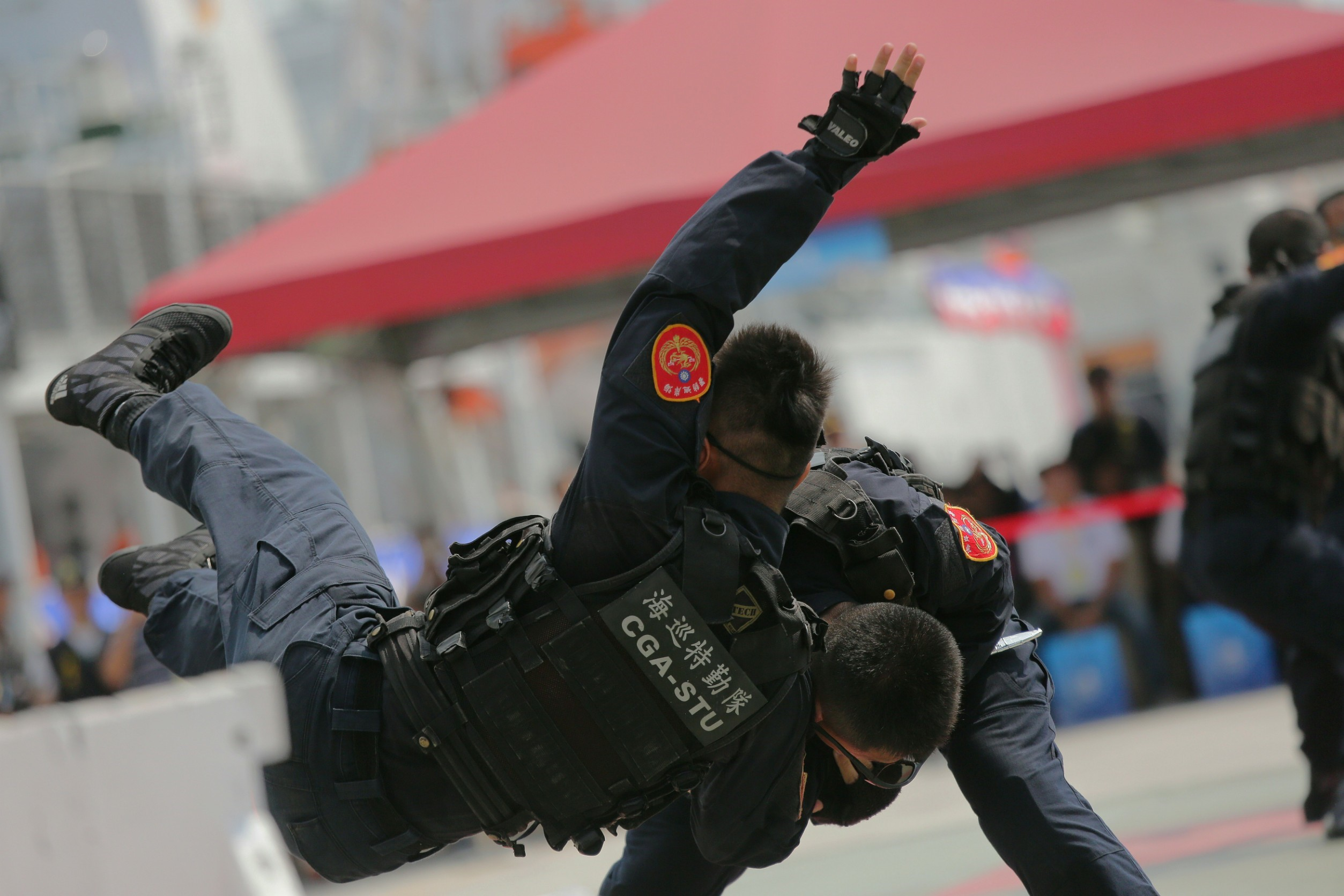 06.10 總統出席世界海洋日暨海安九號演習，觀賞海巡特勤隊以搏擊打擊犯罪的操演